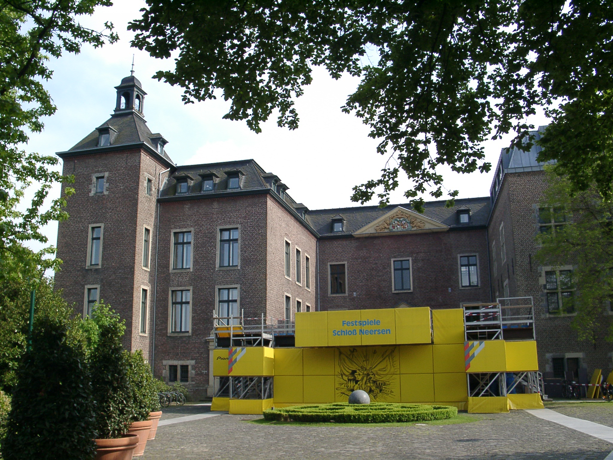 Schloss Neersen mit Festspielbühne, Neersen, Hauptstraße 6 This image shows a heritage building in Germany, located in the North Rhine-Westphalian city Willich (no. 10).